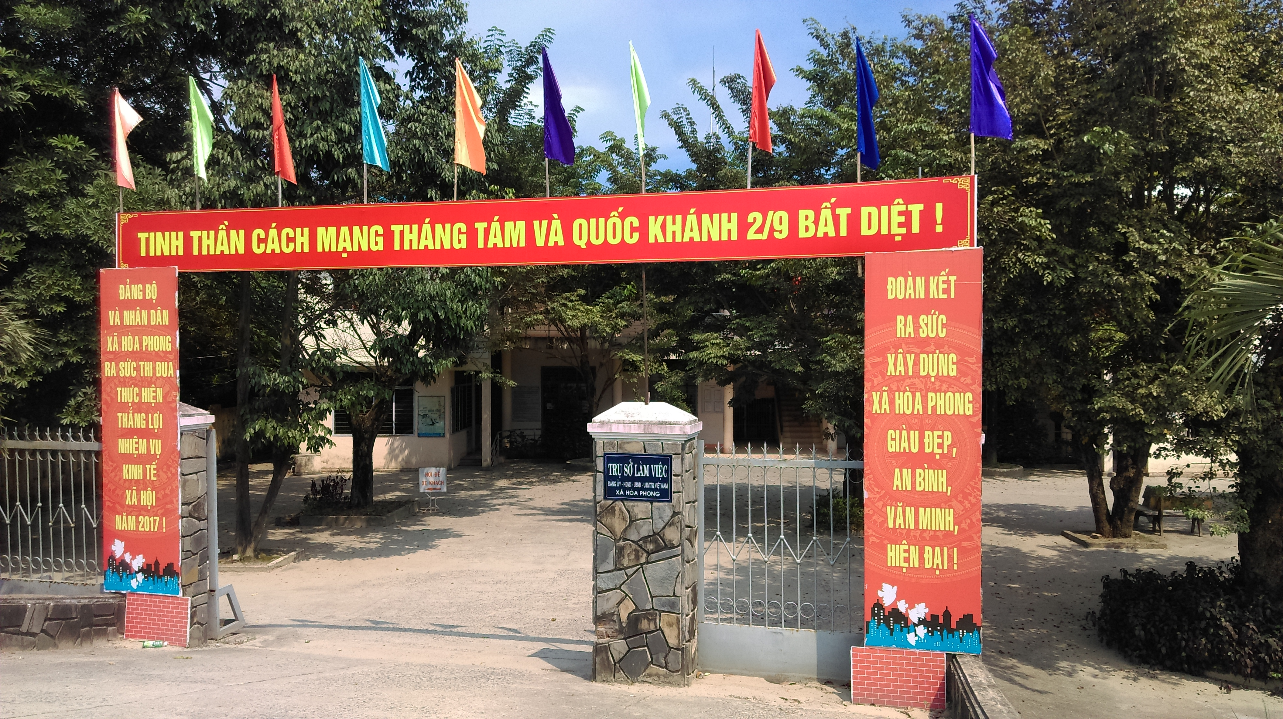 UBND xã Hòa Phong, Hòa Vang, Đà Nẵng